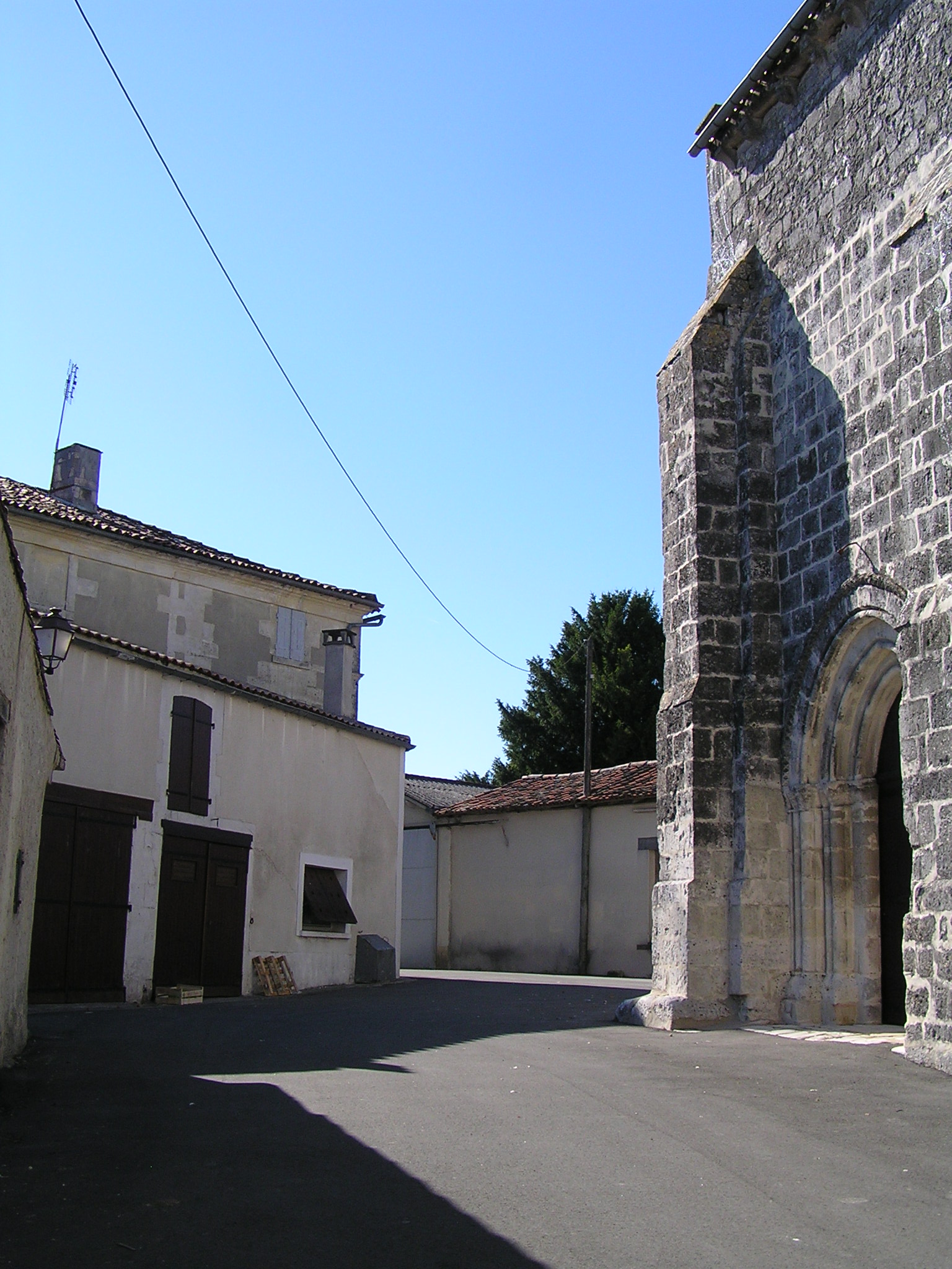 église de Jurignac, Charente, France